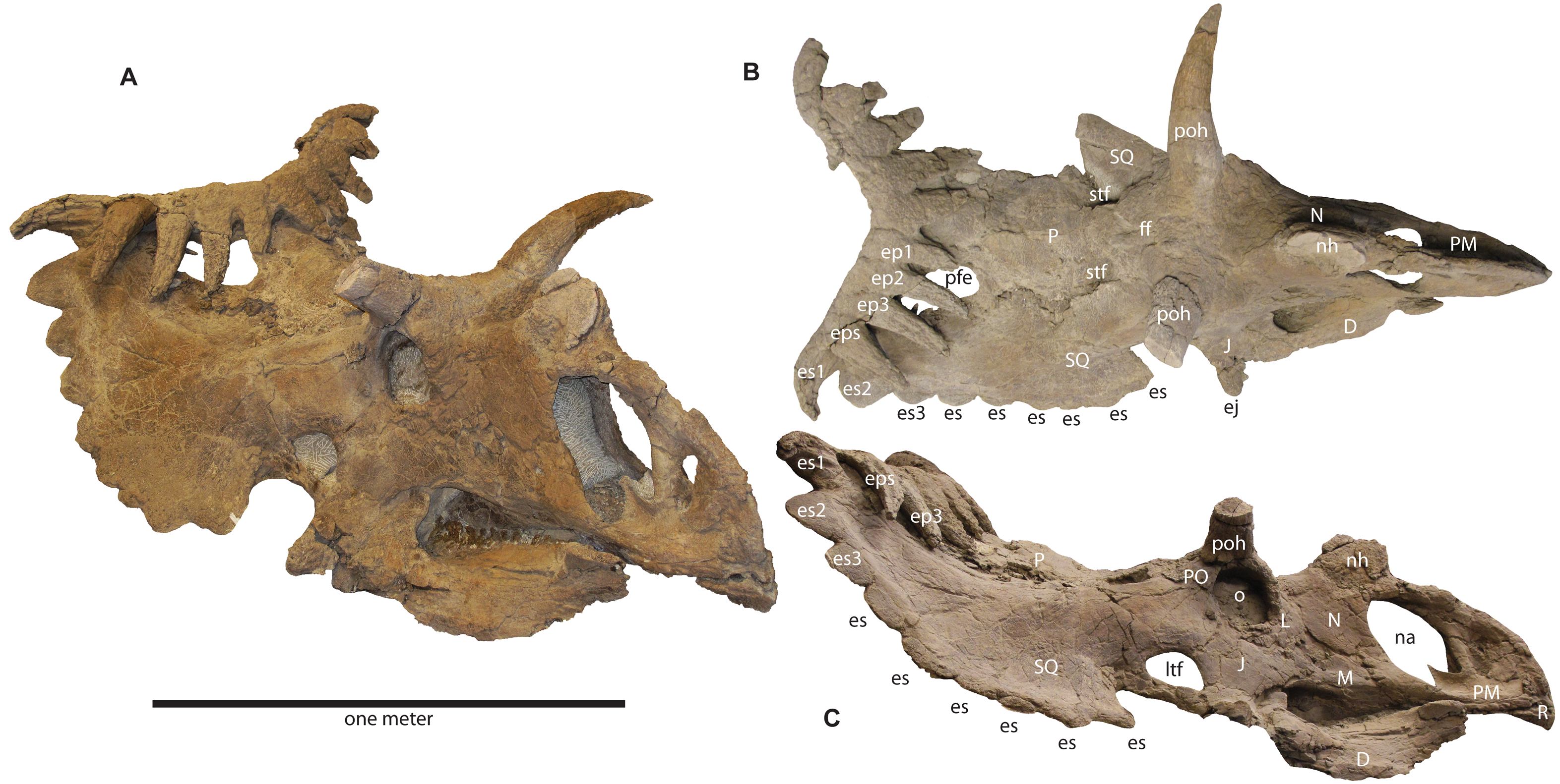 UMNH VP 17000, articulated holotype skull of Kosmoceratops richardsoni n. gen et n. sp. In oblique (A), dorsal (B) and right lateral (C) views. Scale bar represents one meter. Abbreviations: D, dentary; ep, epiparietal position 1–3; eps, epiparietosquamosal; es, episquamosal; ff, frontal fontanelle; J, jugal; L, lacrimal; ltf, laterotemporal fenestra; M, maxilla; N, nasal; na, naris; nh, nasal horncore; o, orbit; P, parietal; pfe, parietal fenestra; PM, premaxilla; PO, postorbital; poh, postorbital horncore; R, rostrum; sq, squamosal; stf, supratemporal fenestra.